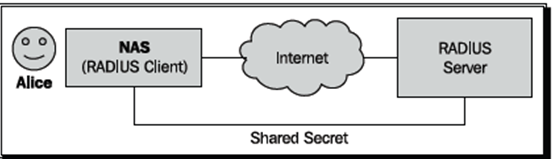 Монгол: NAS